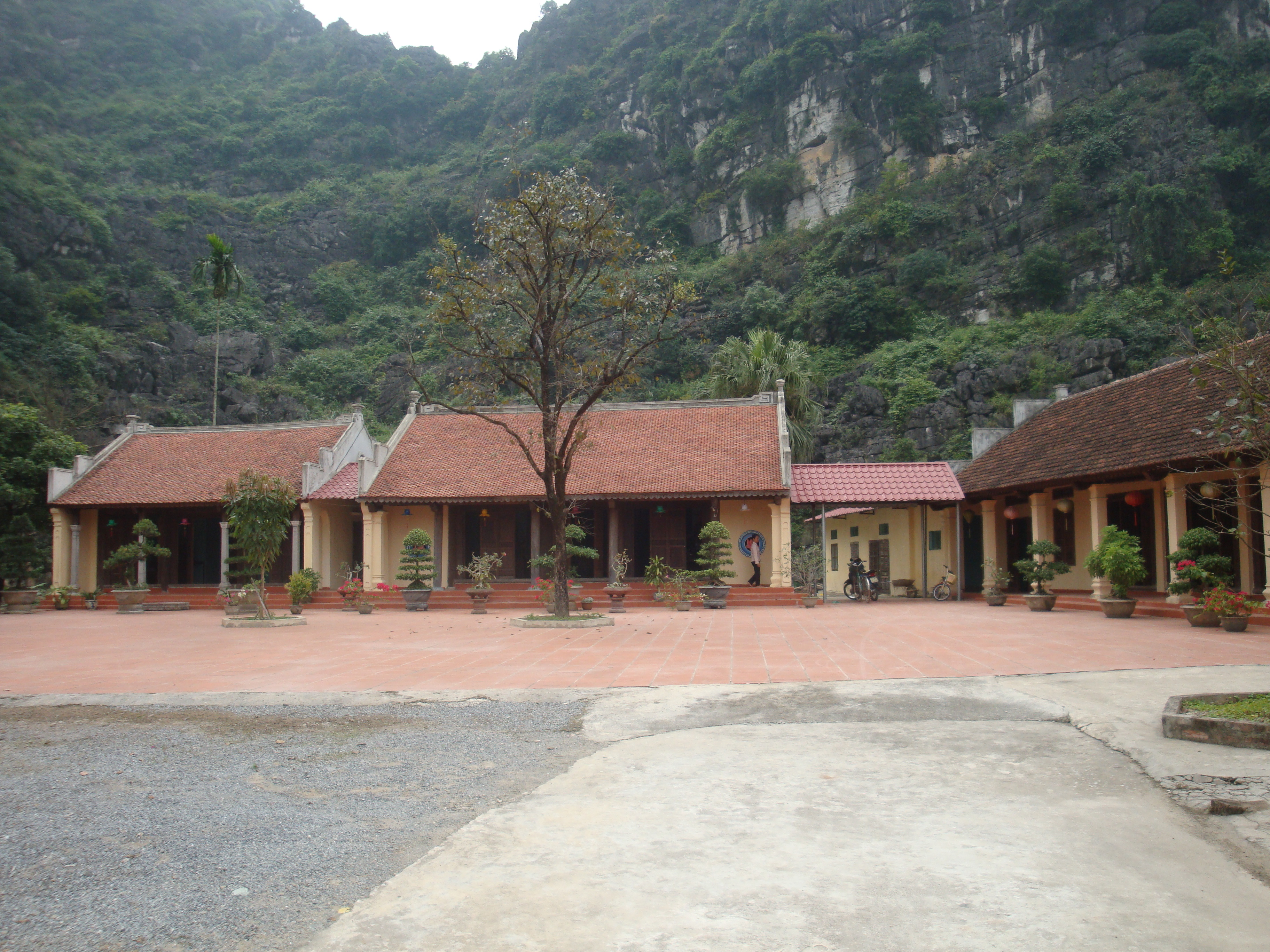 chùa Duyên Ninh thuộc cố đô Hoa Lư, chùa nằm bên đại lộ Tràng An